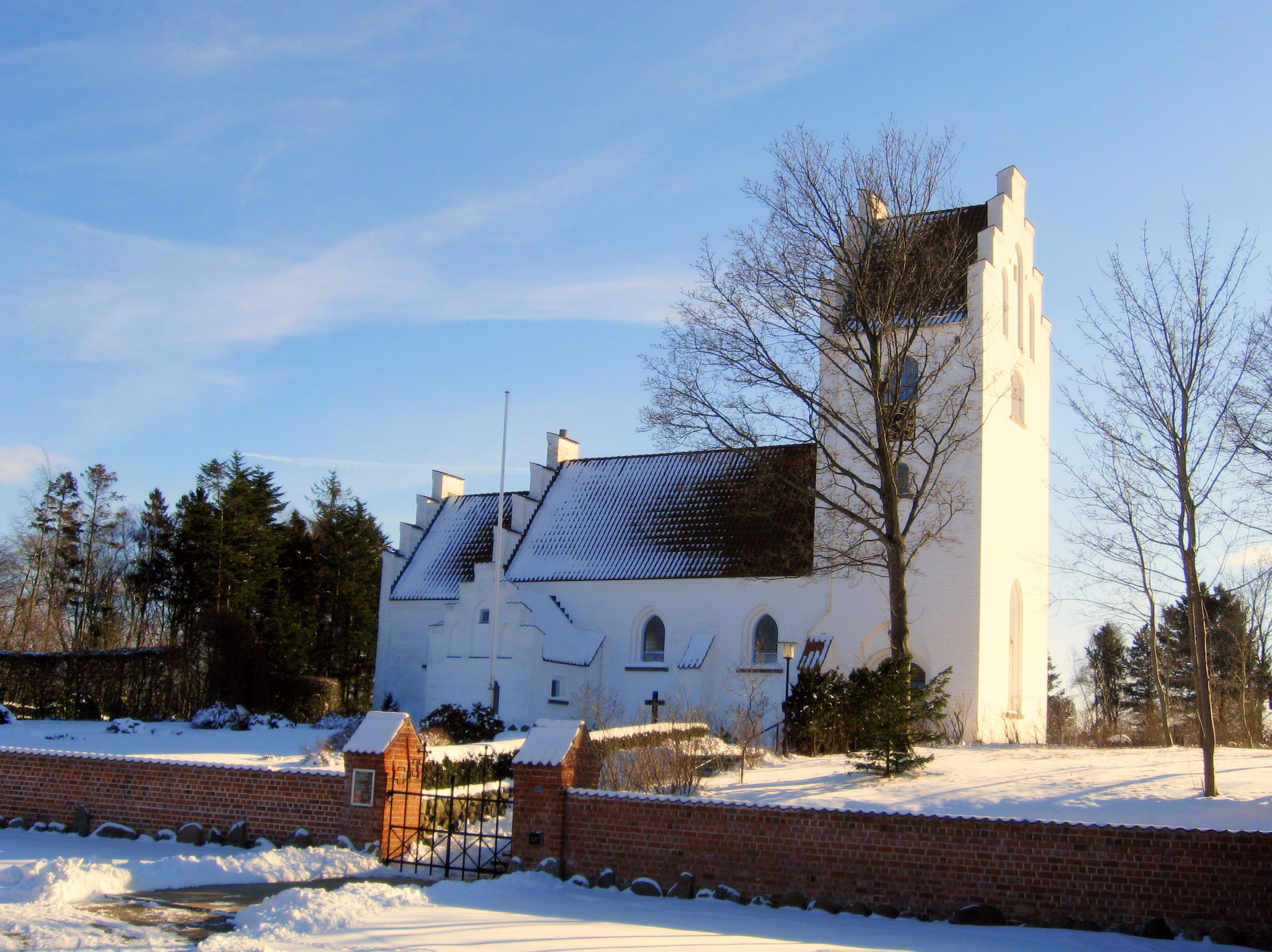 Kvissel Kirke, Frederikshavn Kommune